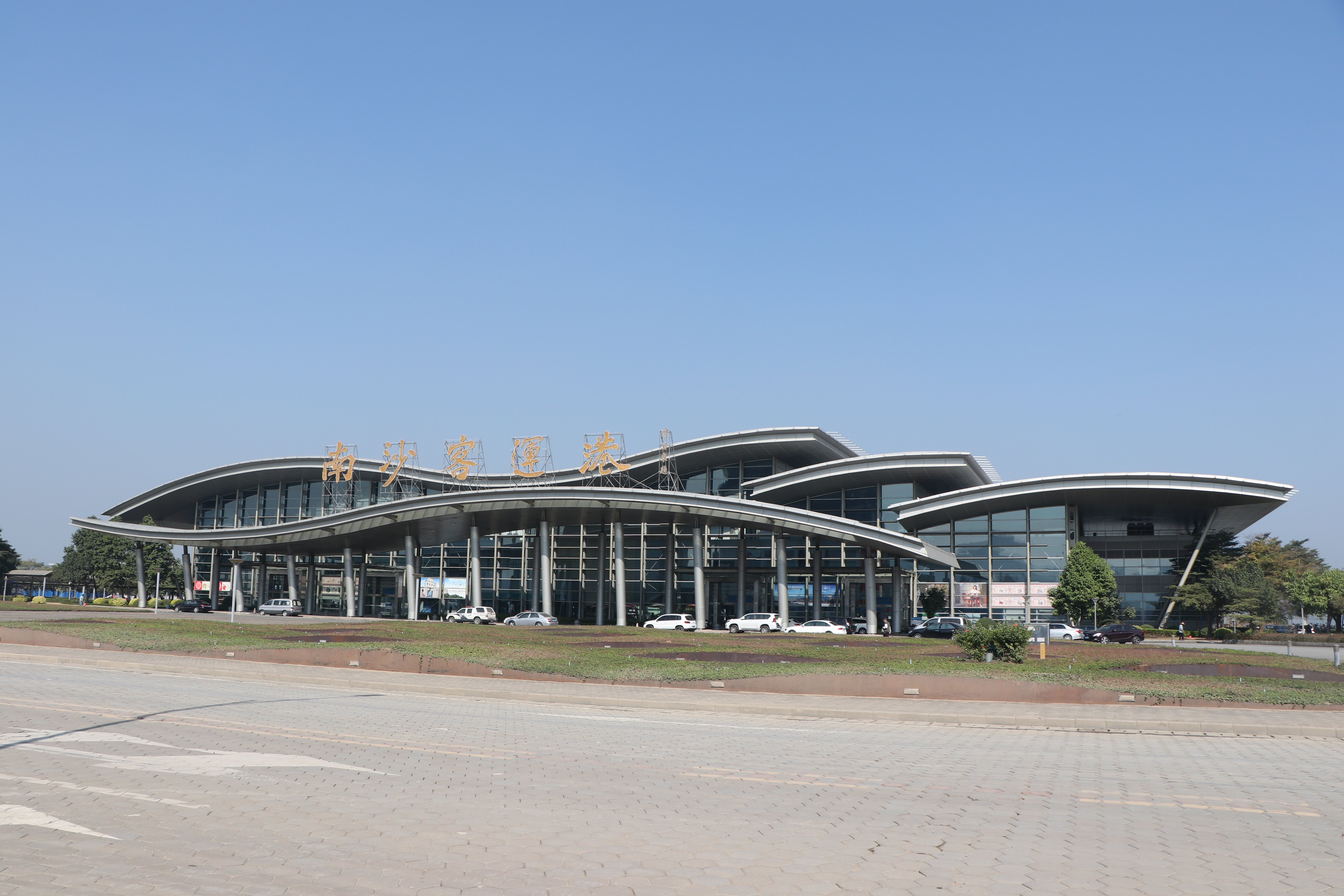 粵語: 南沙客運港